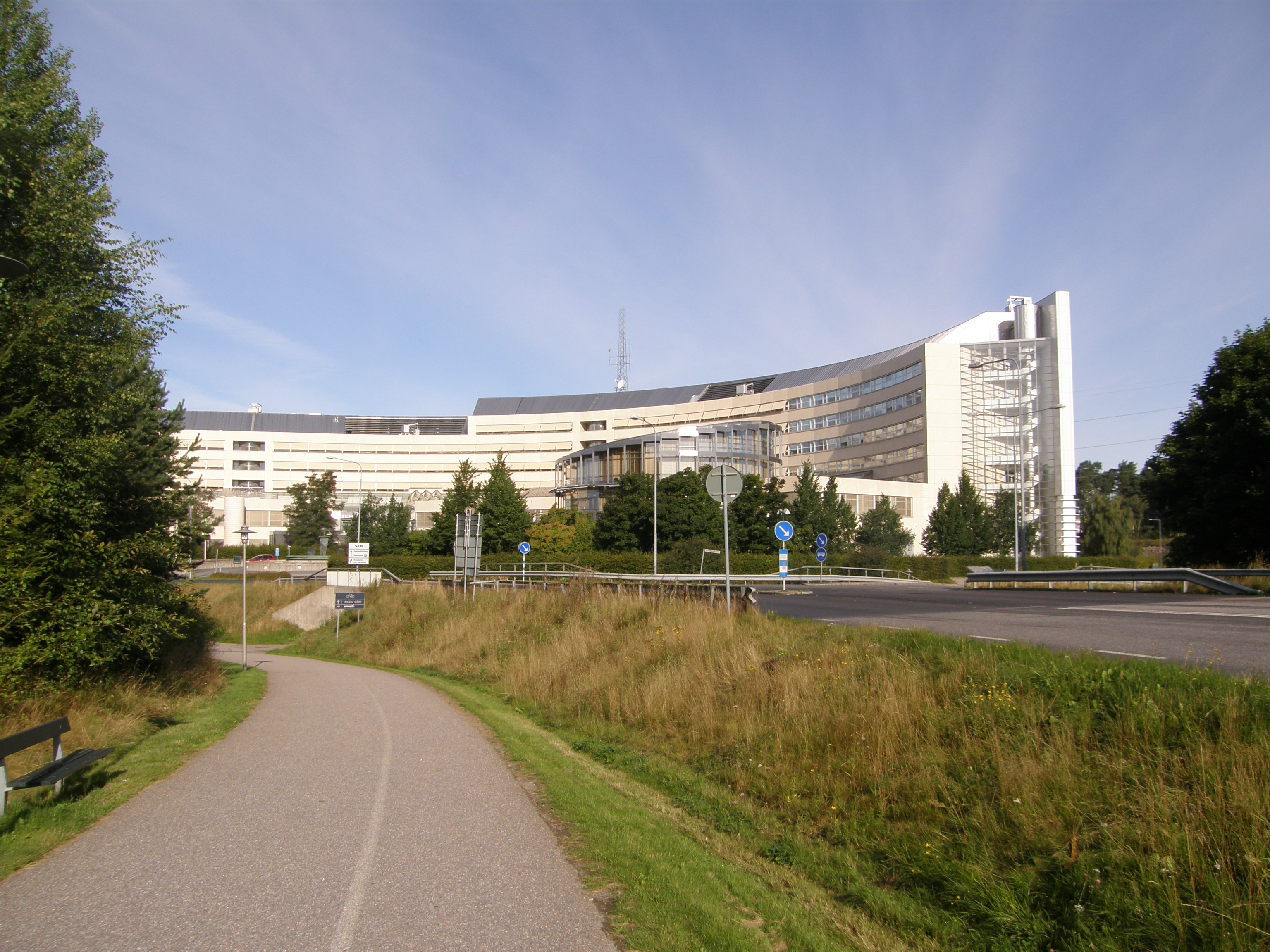 SEB Rissne